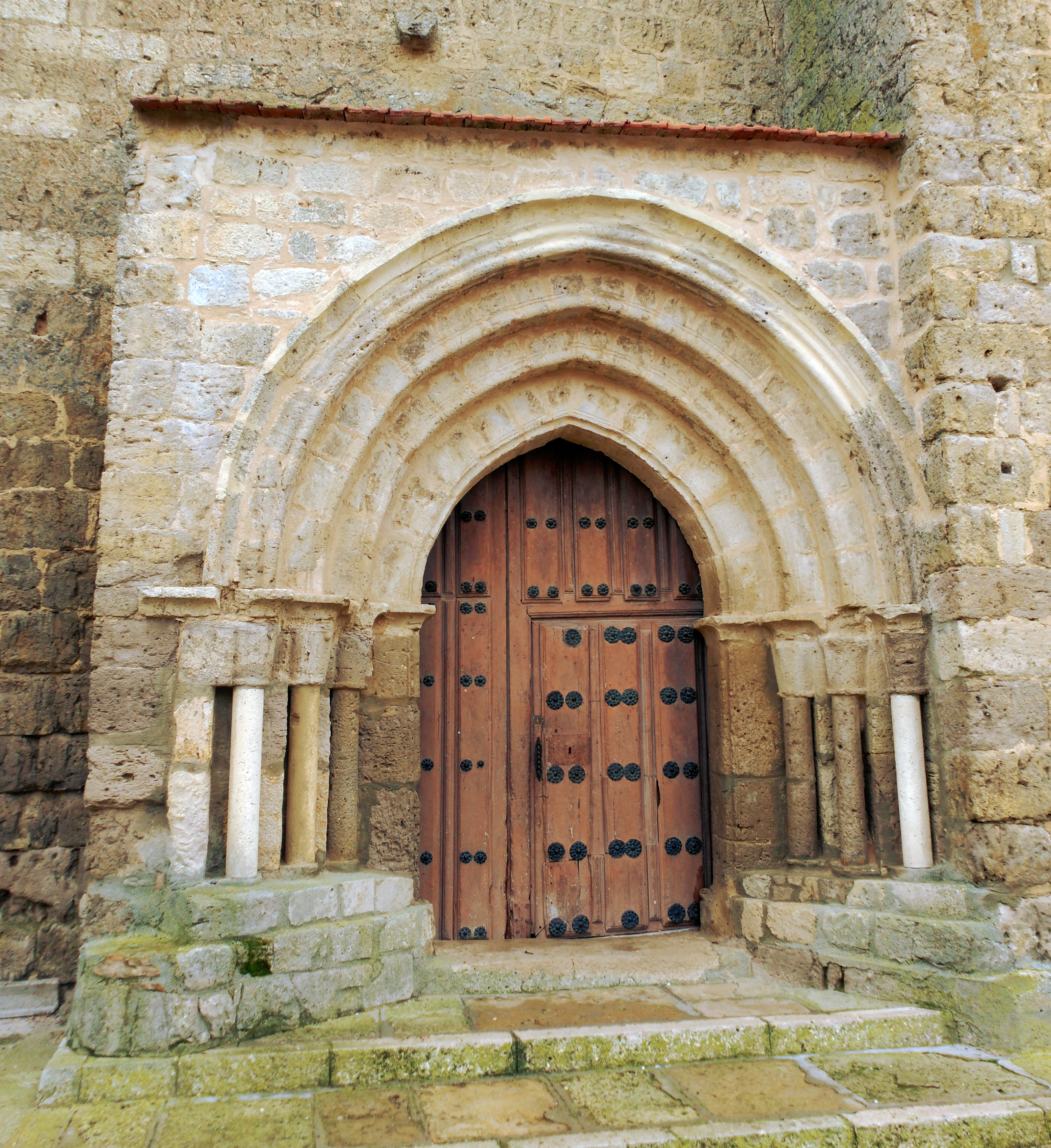 Iglesia parroquial de San Vicente Mártir en Valdenebro de los Valles (Valladolid), portada.